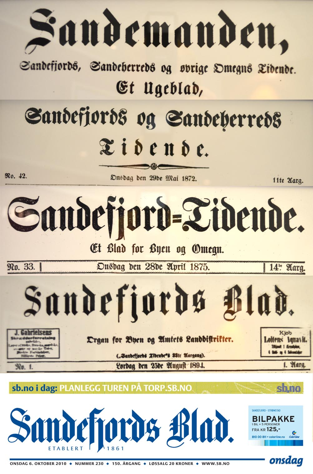 Forsidene